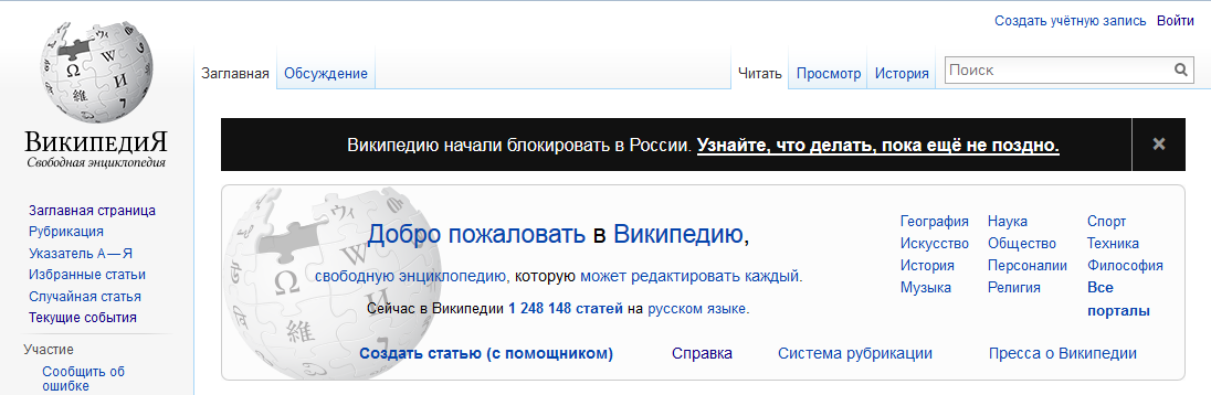 Главная страница русской Википедии 24 августа 2015 года